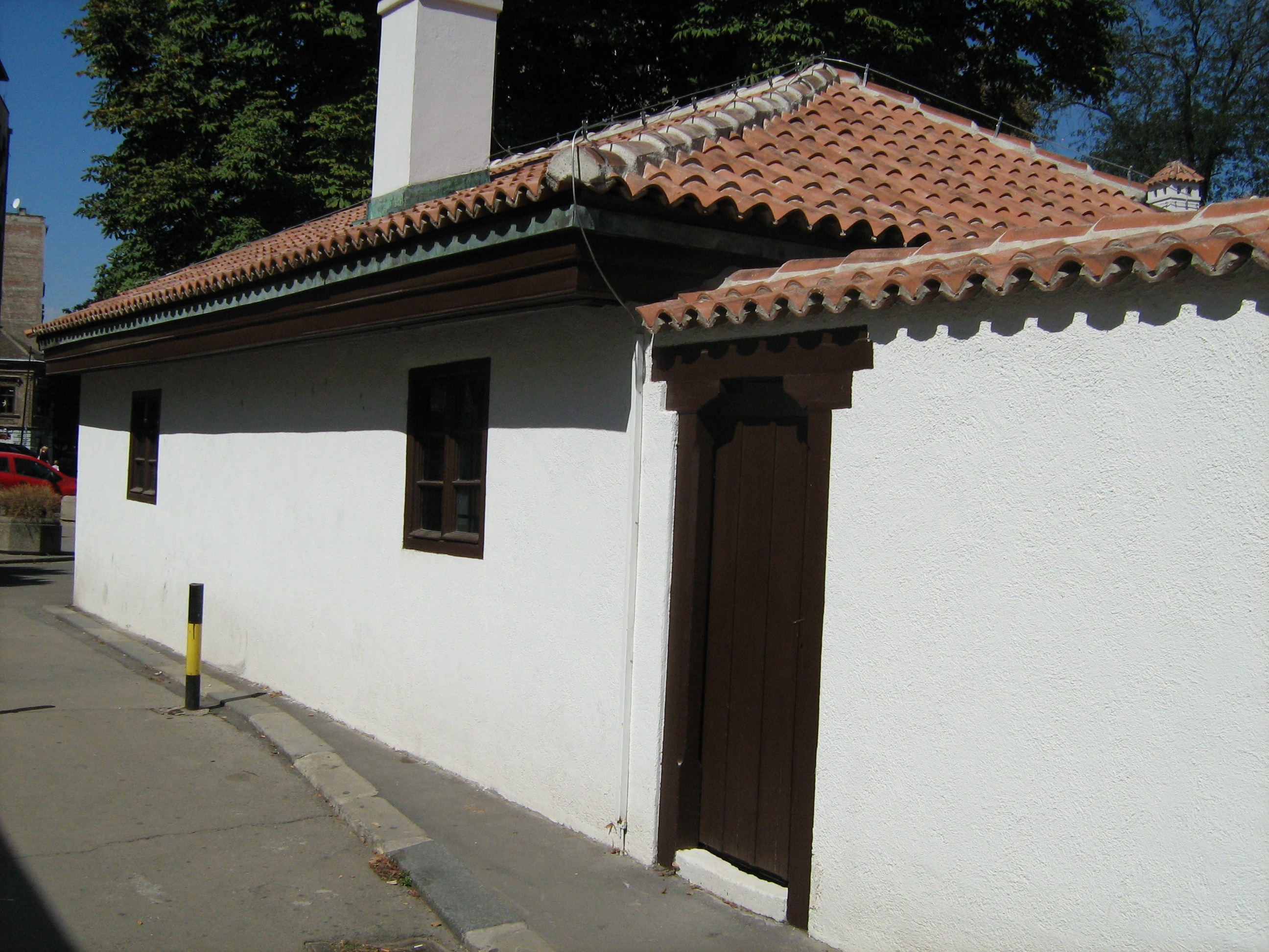 Доситејев лицеј, Господар Јевремова 21, Београд